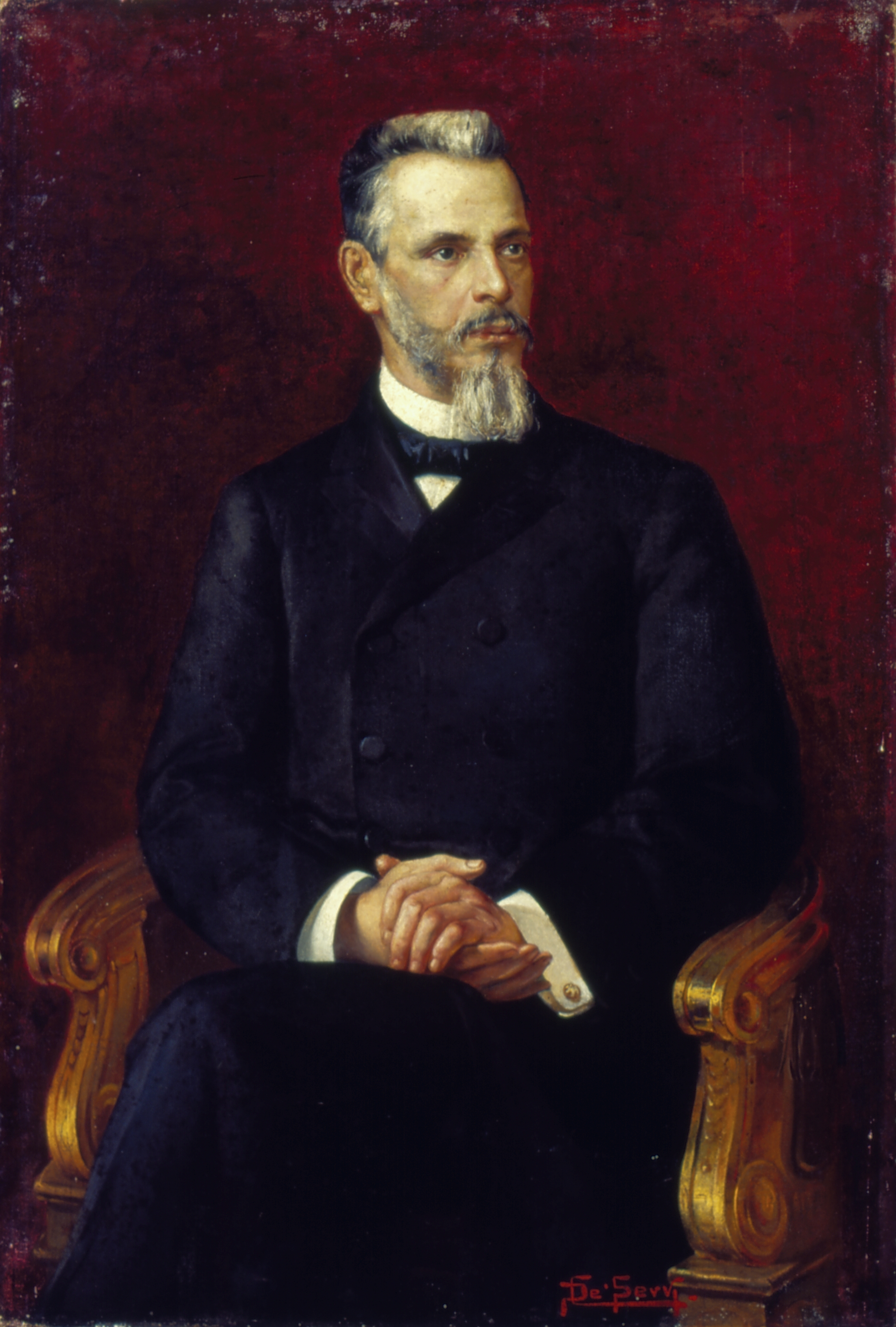 Obra que integra o acervo do Museu Paulista da USP.